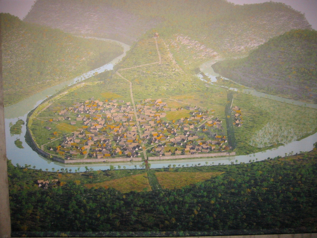 Village Gaulois des Séquanes sur le site de la ville de Besançon de -1000 à JC